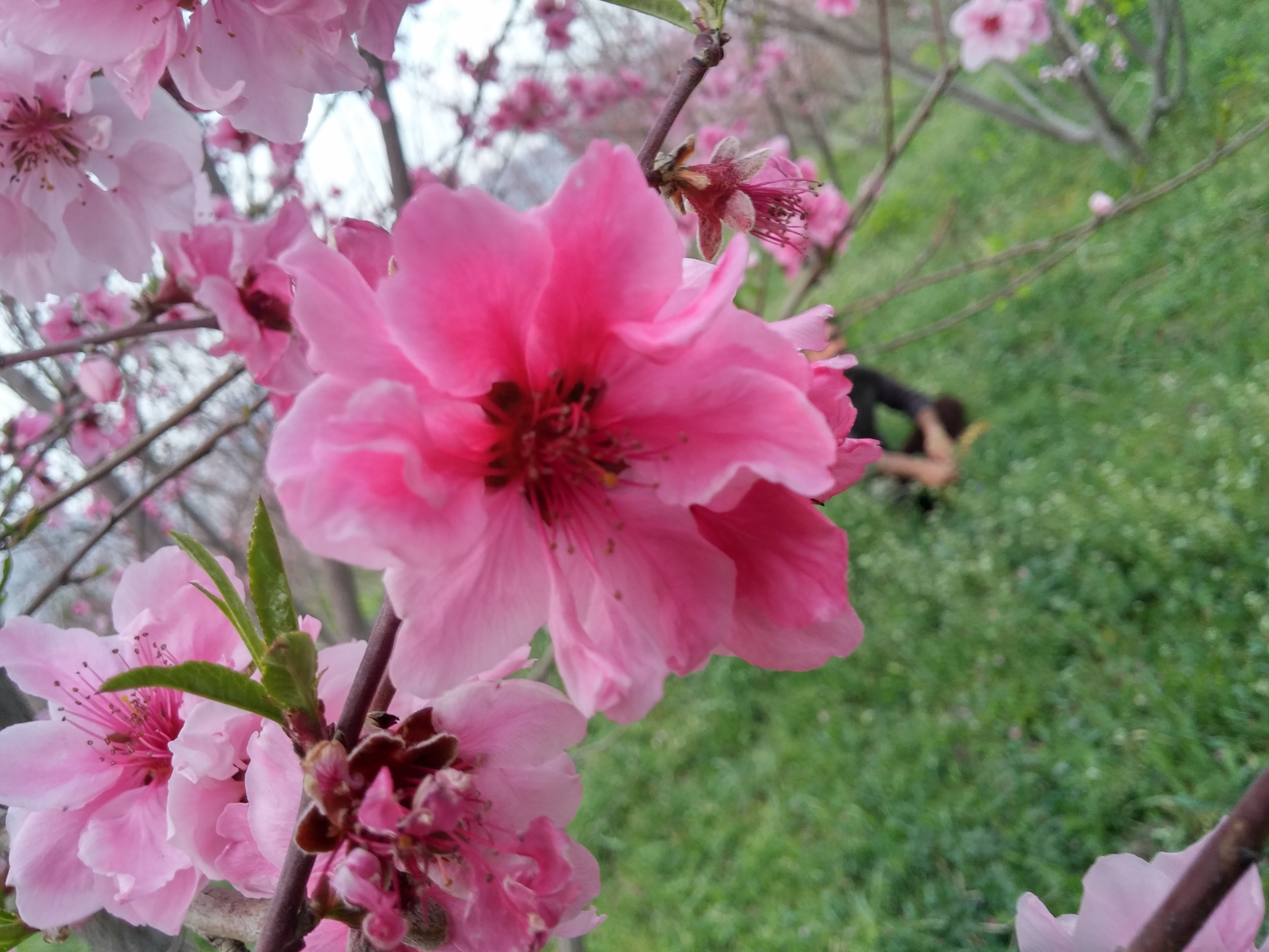 بهار زیبای سرزنگوله